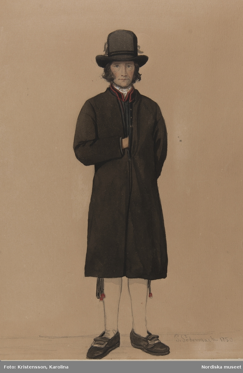 Man, Kessjerker i Lima. P. Södermark 1850 Depicted place: Lima (Ort), Q10556734 (Q10556734)